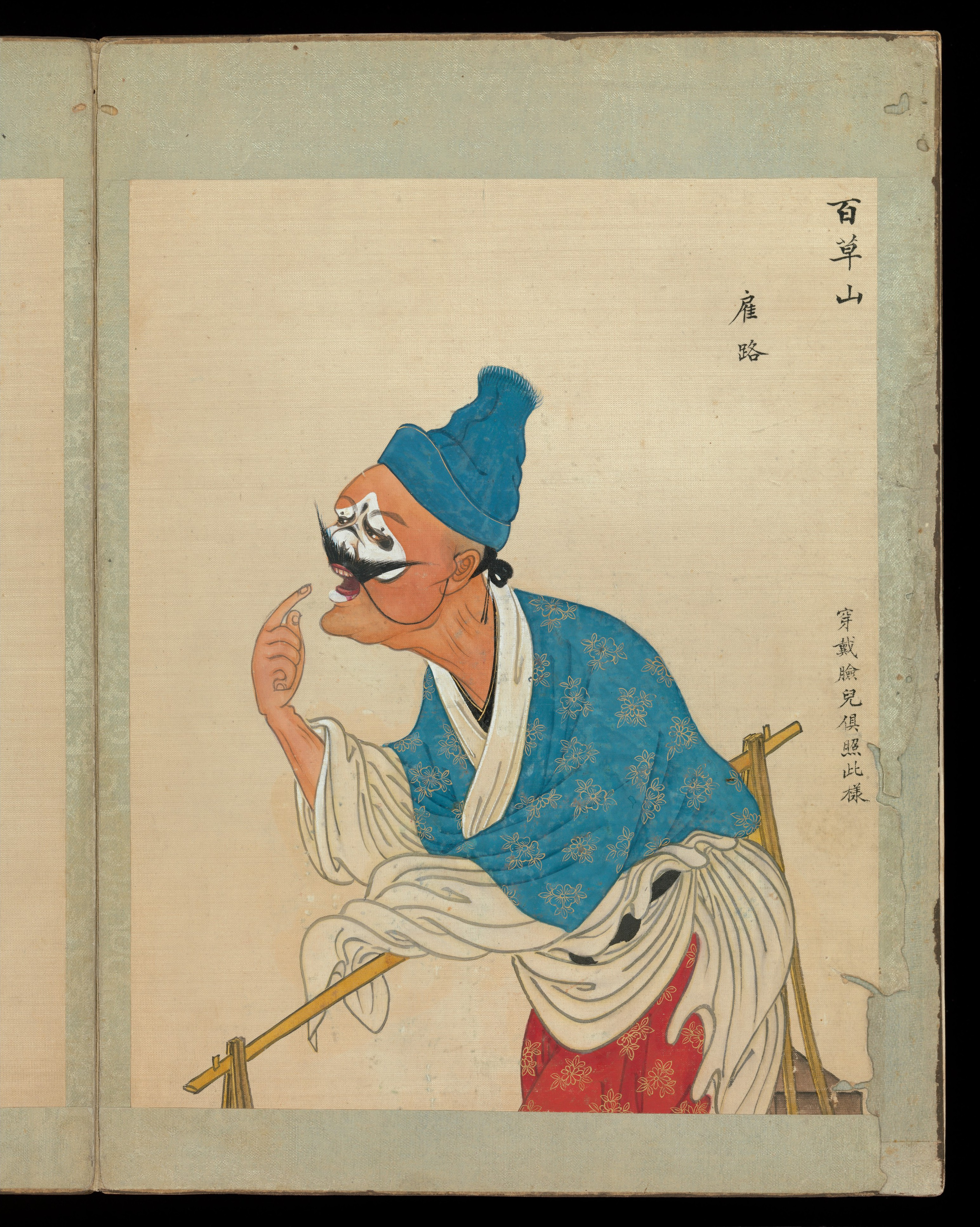 China; Album; Paintings